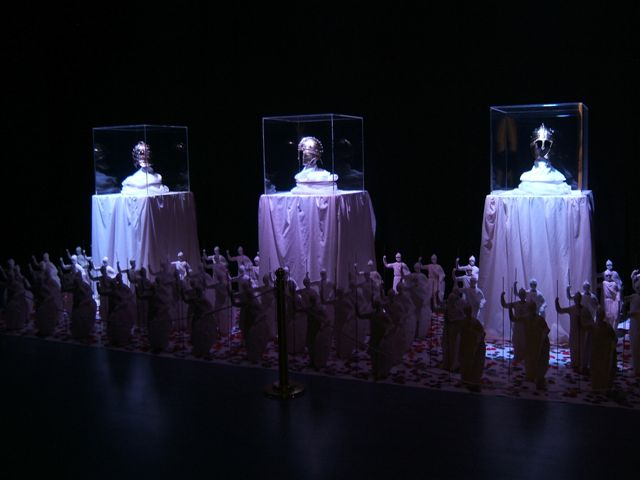 Музеј Војводине - Ноћ музеја 2009. Поставка три позлаћена касноримска шлема.